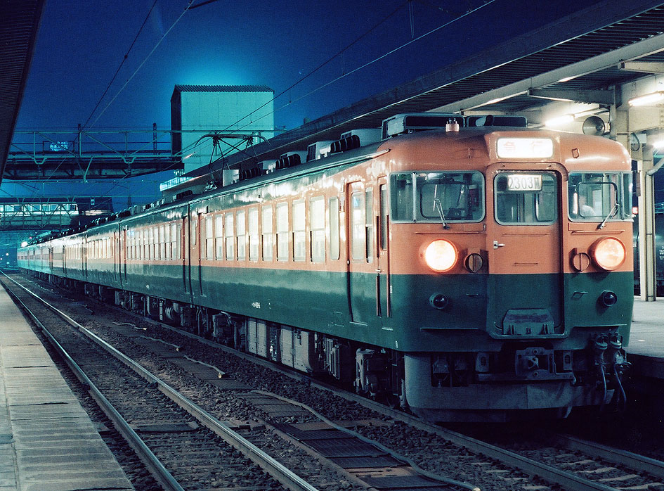 国鉄169系急行形電車 急行「妙高3号」